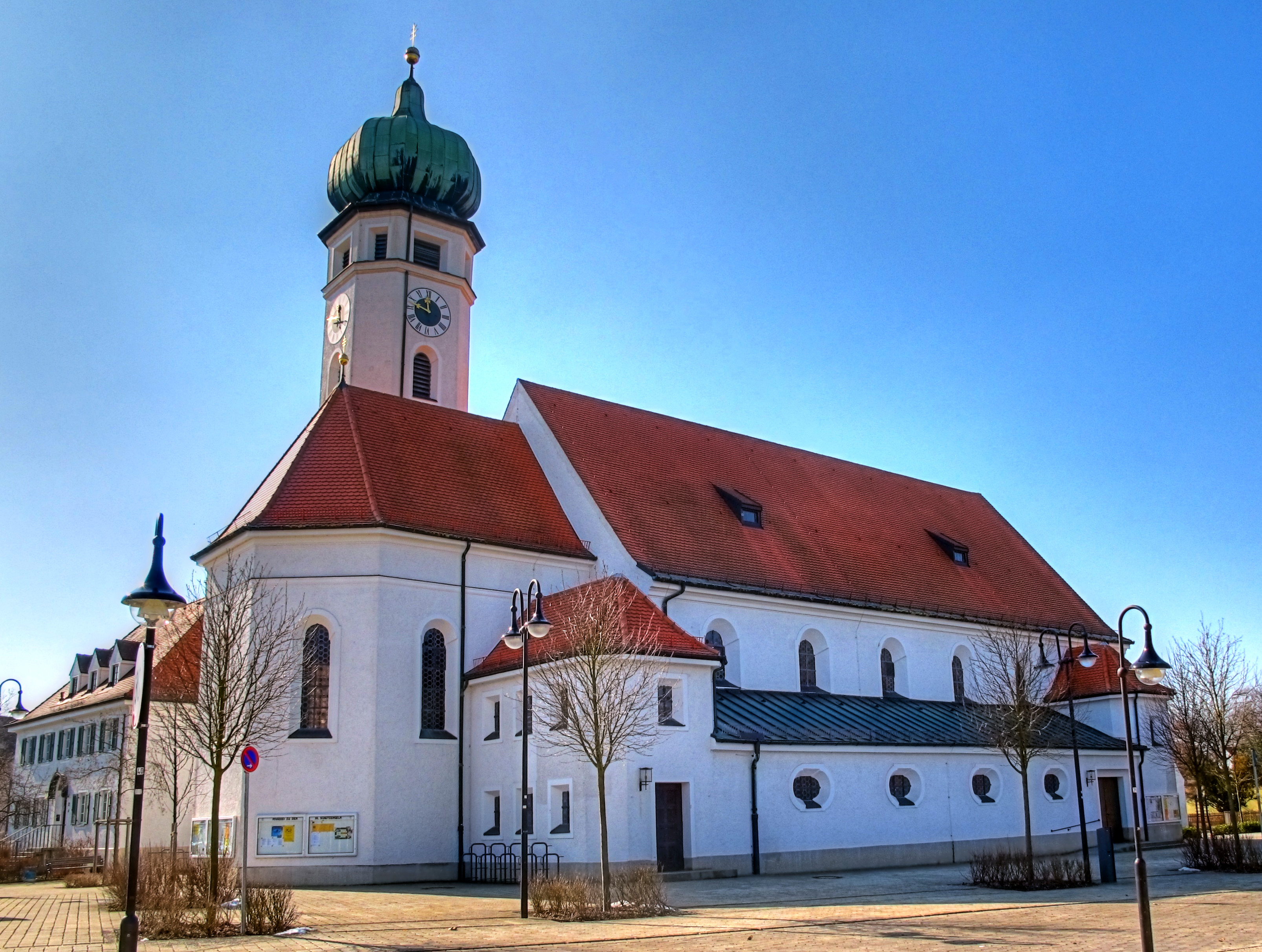 Deutschland, Bayern, Oberbayern, Landkreis Fürstenfeldbruck, Gemeinde Eichenau, katholische Pfarrkirche "Zu den Heiligen Schutzengeln". Ansicht aus NO